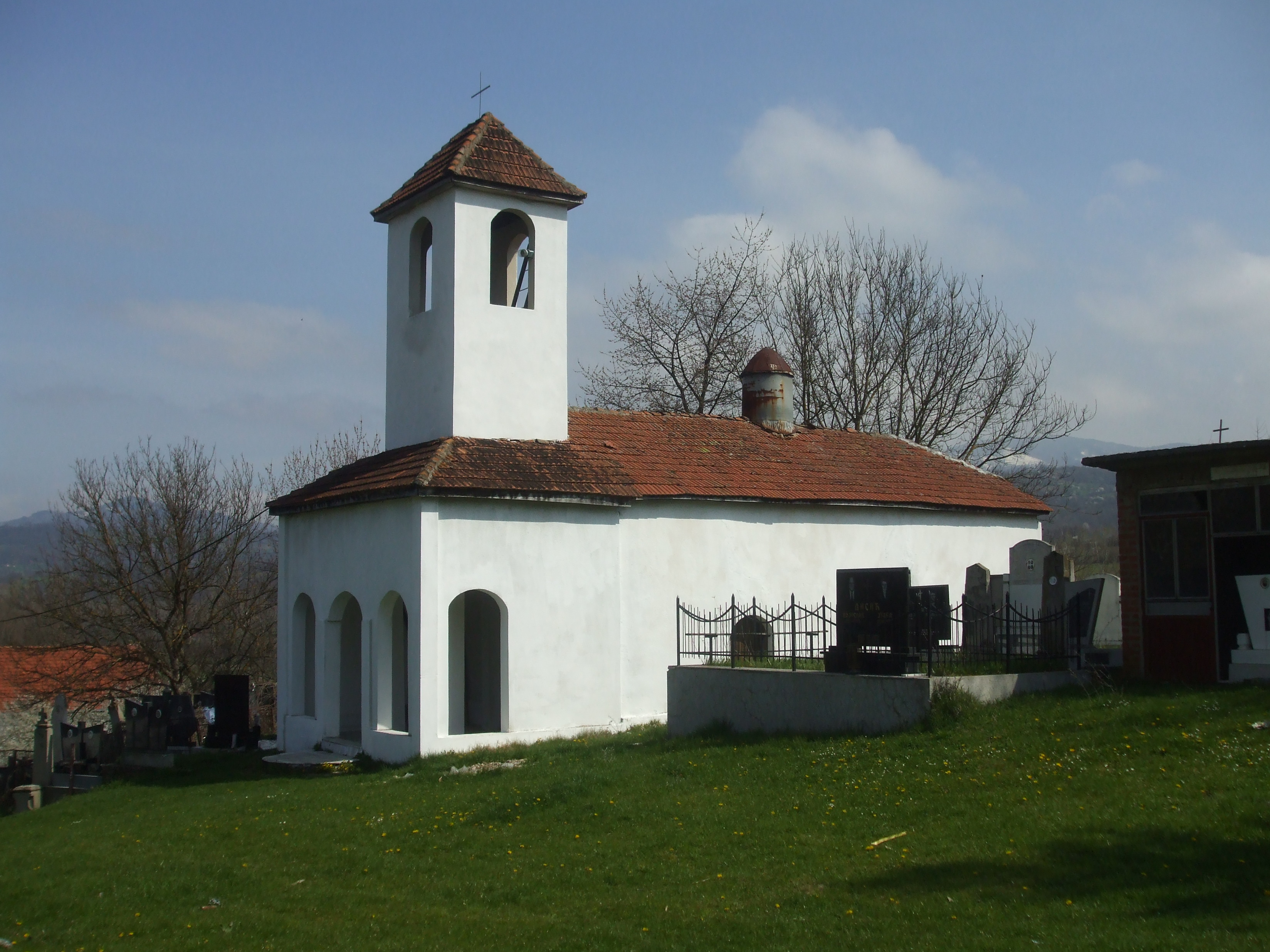 Власе, црква Светог Пророка Илије, поглед са југа. Види се део главног, доњег, гробља. Снимио Драгољуб.